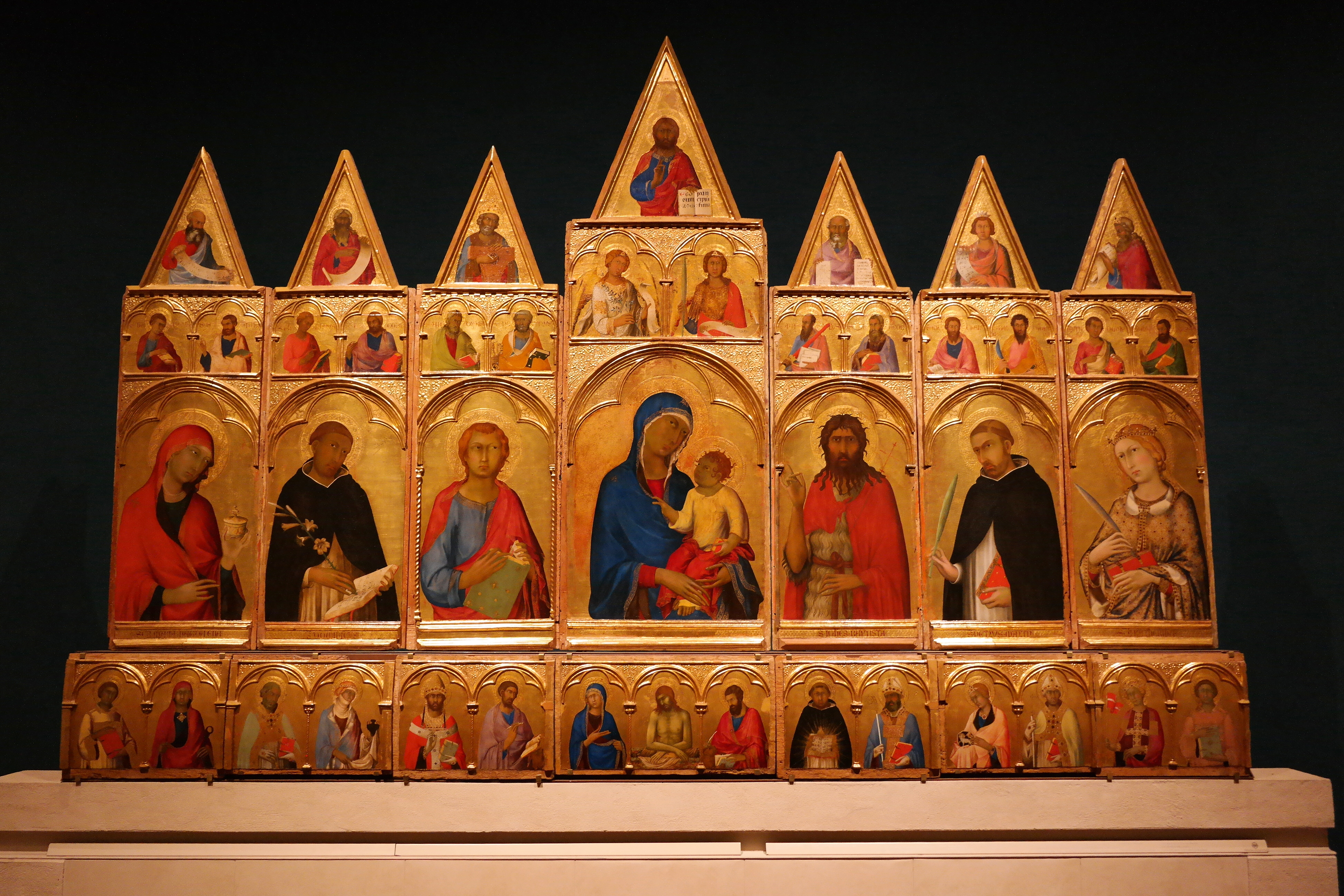 Polittico di Santa Caterina, di Simone Martini, conservato nel Museo Nazionale di San Matteo a Pisa